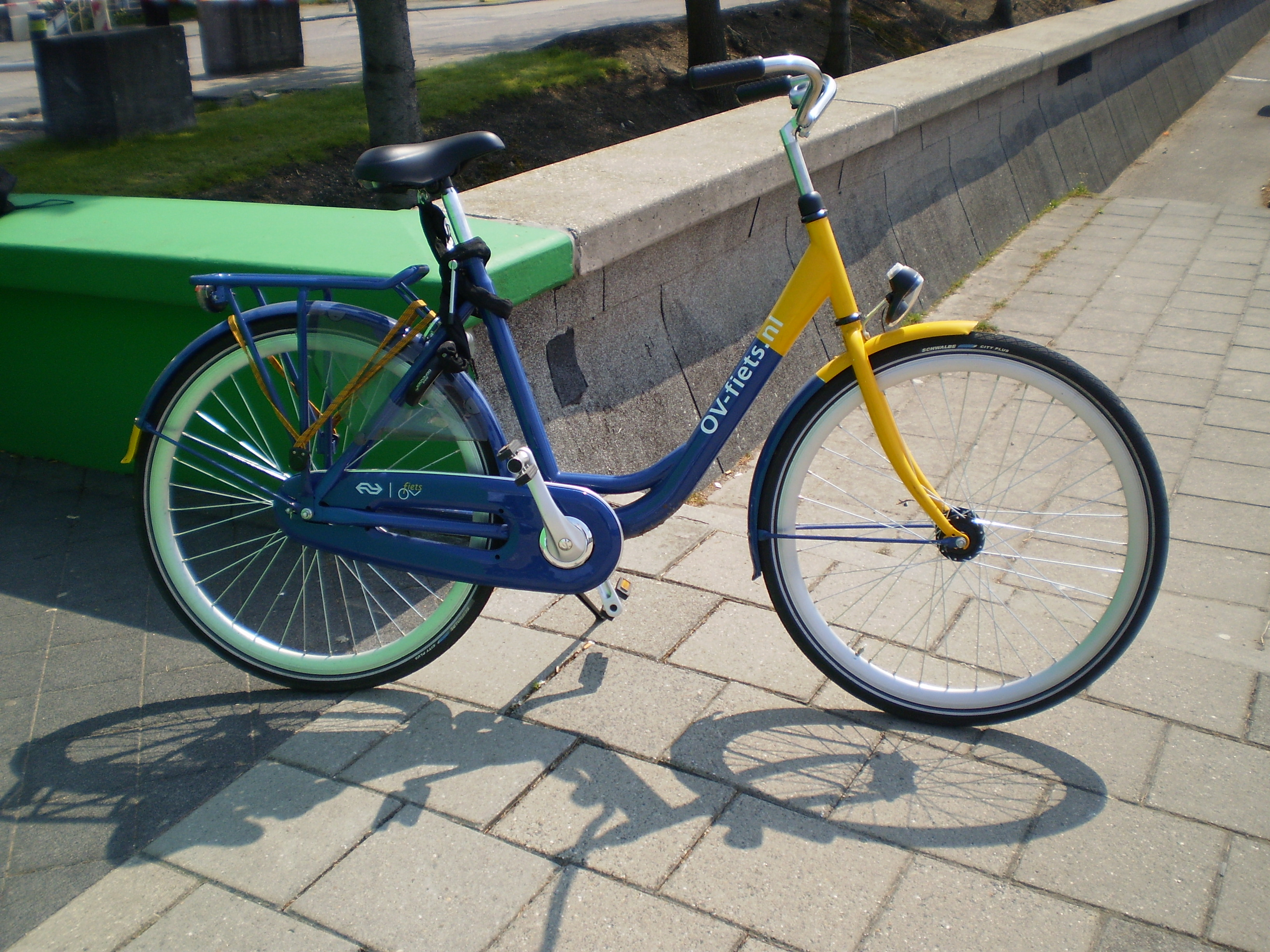 OV-fiets editie 2009